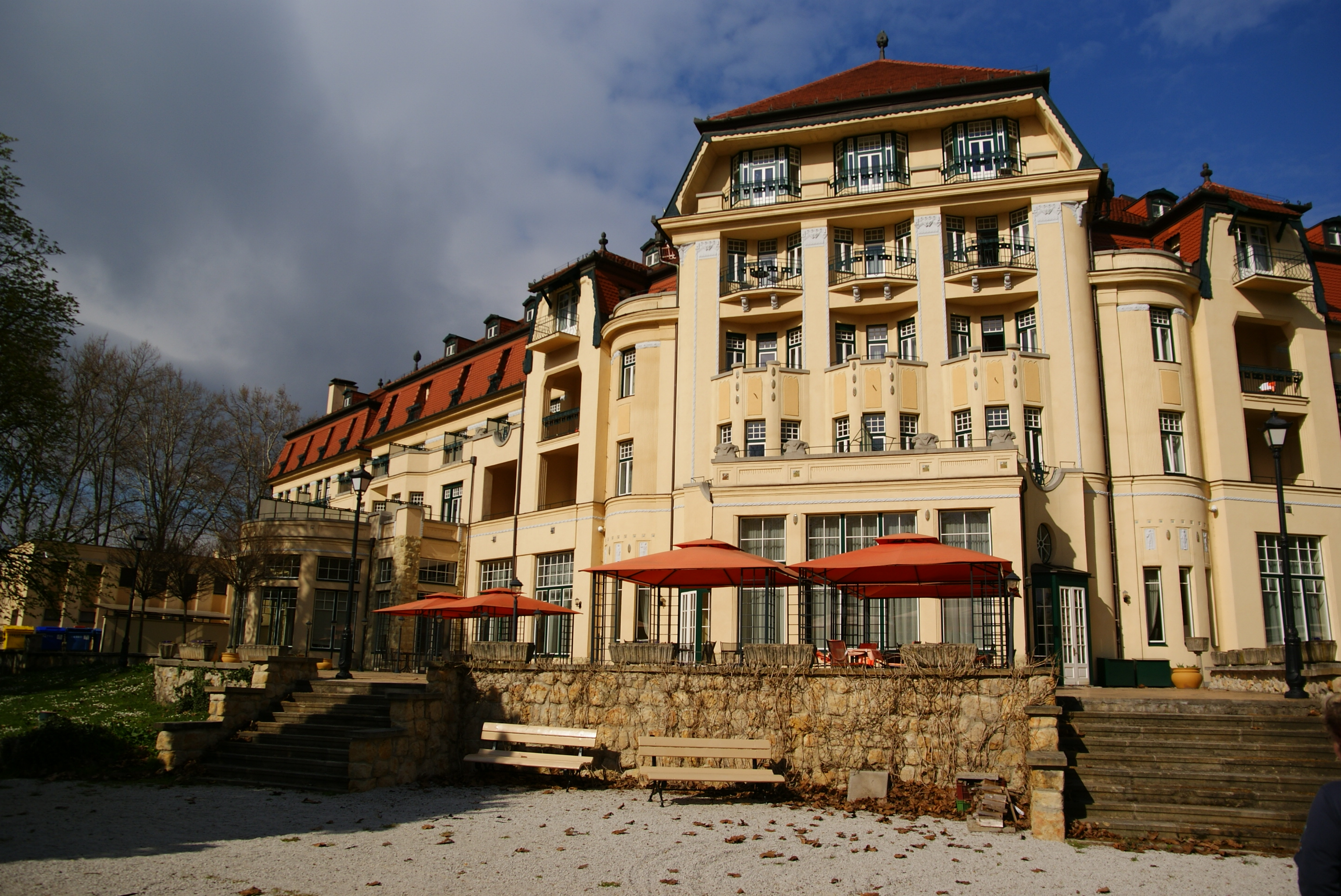 DOM LIEČEBNÝ